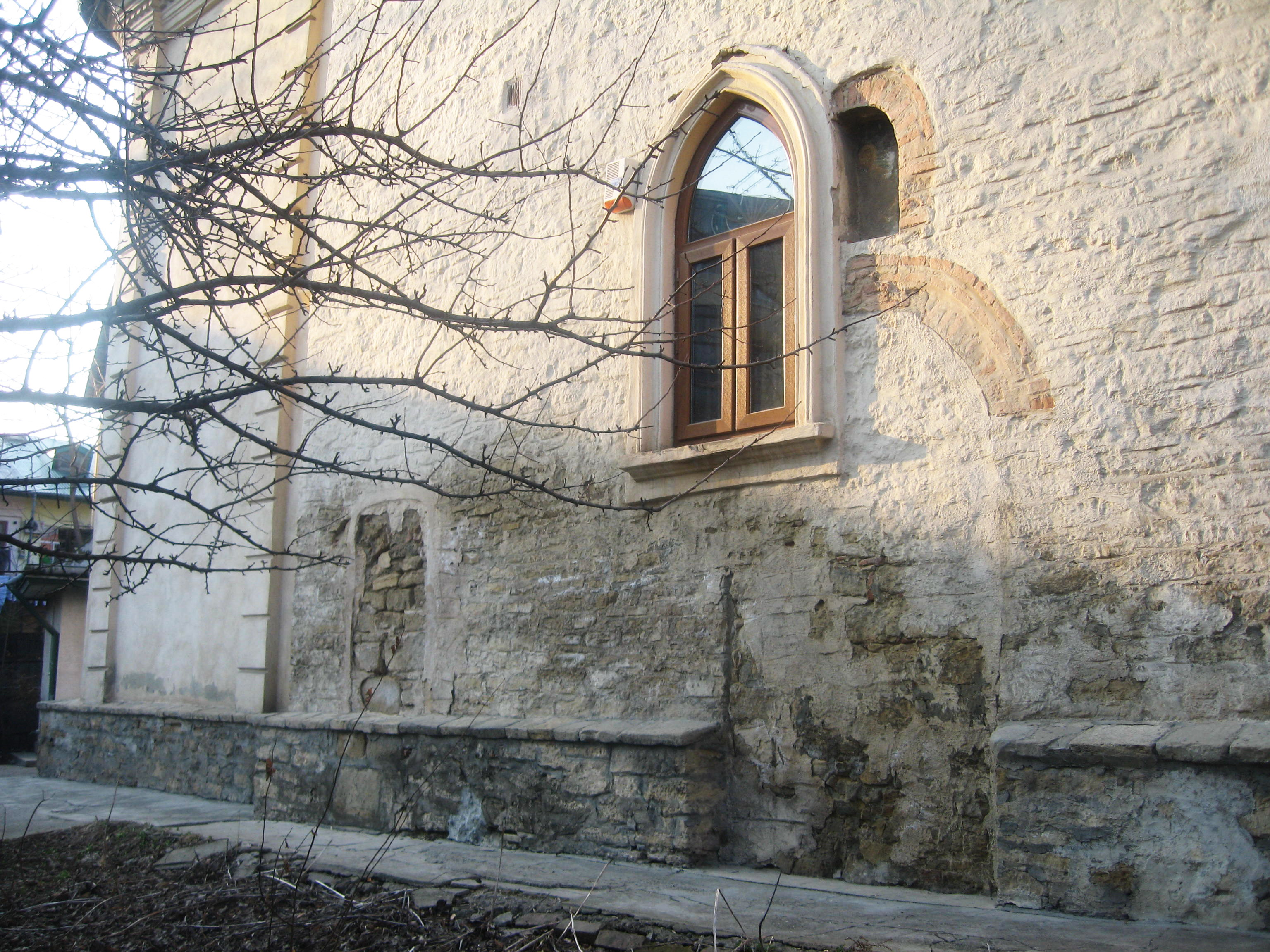 Biserica "Sf. Dumitru" - Balș din Iași